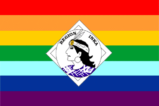 Bandera de la regió Inka (fins el 1992)